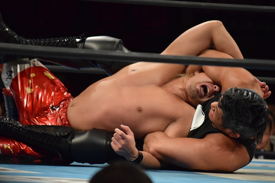 2017年3月12日 ベイコム総合体育館 「NEW JAPAN CUP 2017」 YOSHI-HASHIにSkull Endを極めるSANADA